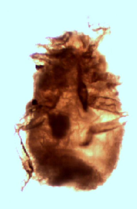 P.s. Blattlaus der Virgo generation unter dem licht mikroskop bei 10facher vergrößerung (manuell weiter vergrößert in Phostoshop)